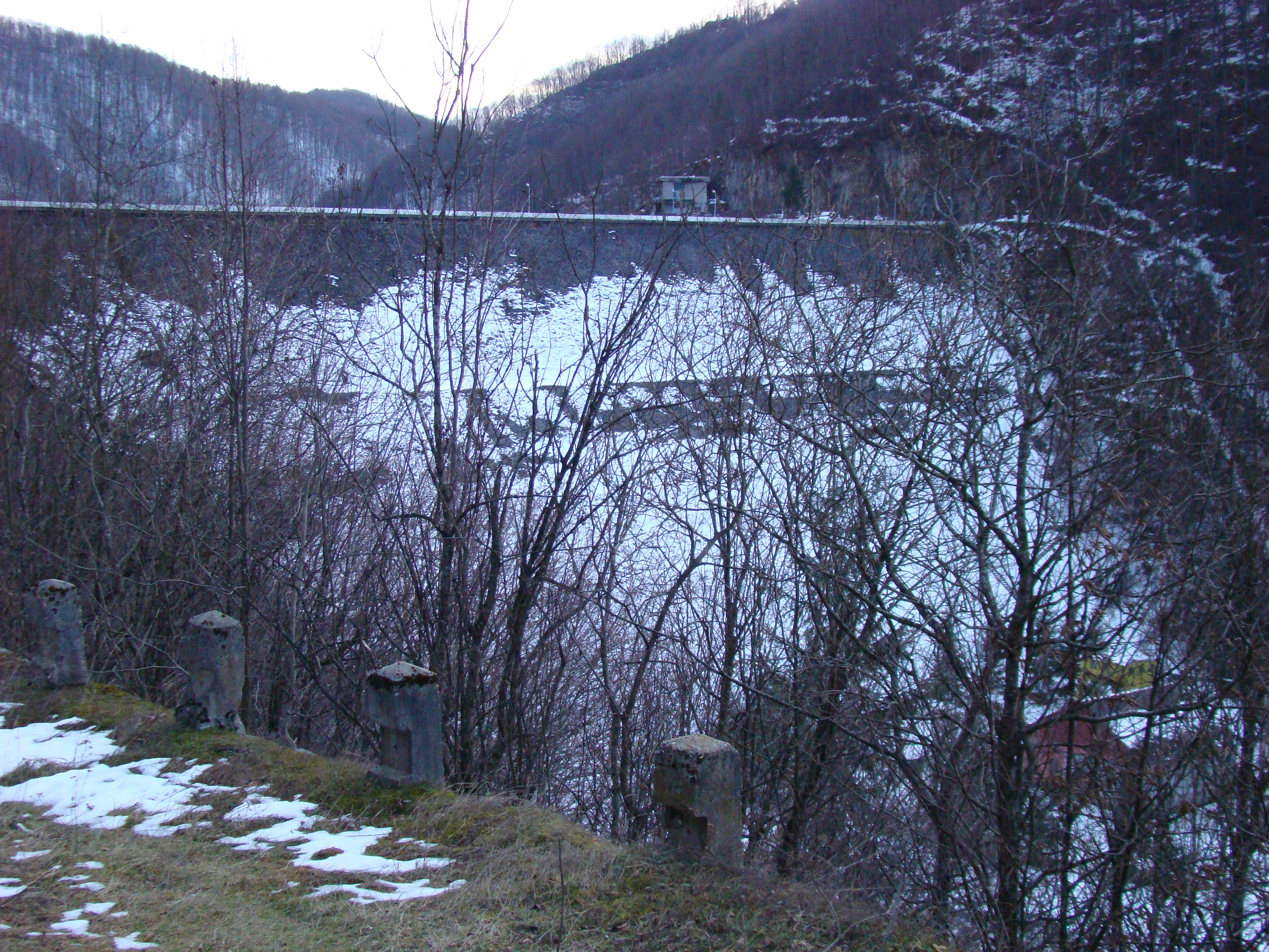 Barajul Leșu și zona învecinată